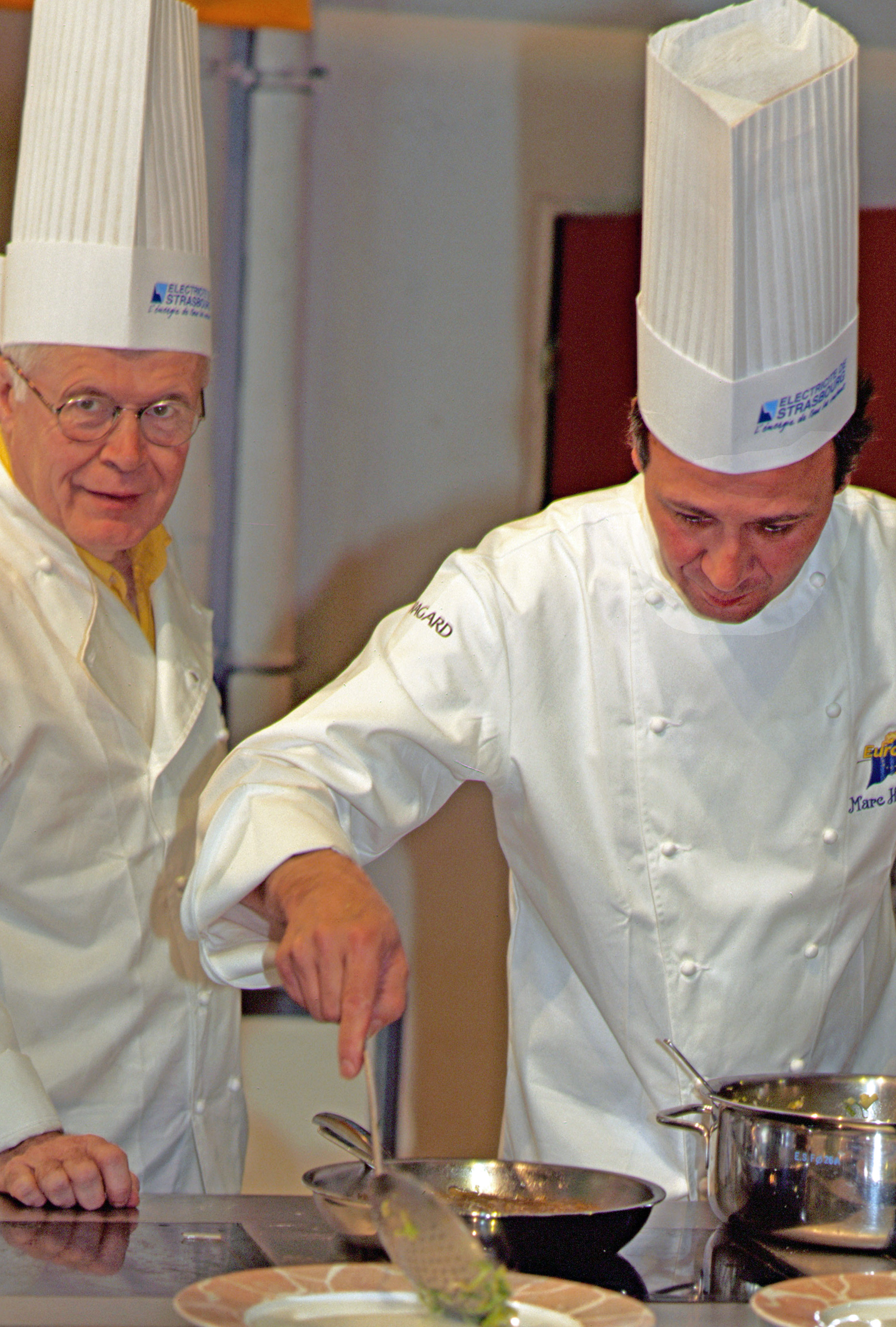 Préparation d'un plat en public à Eurobière, en 1997 : Andouillette de Troyes cuisinée à la bière par Marc Haeberlin.